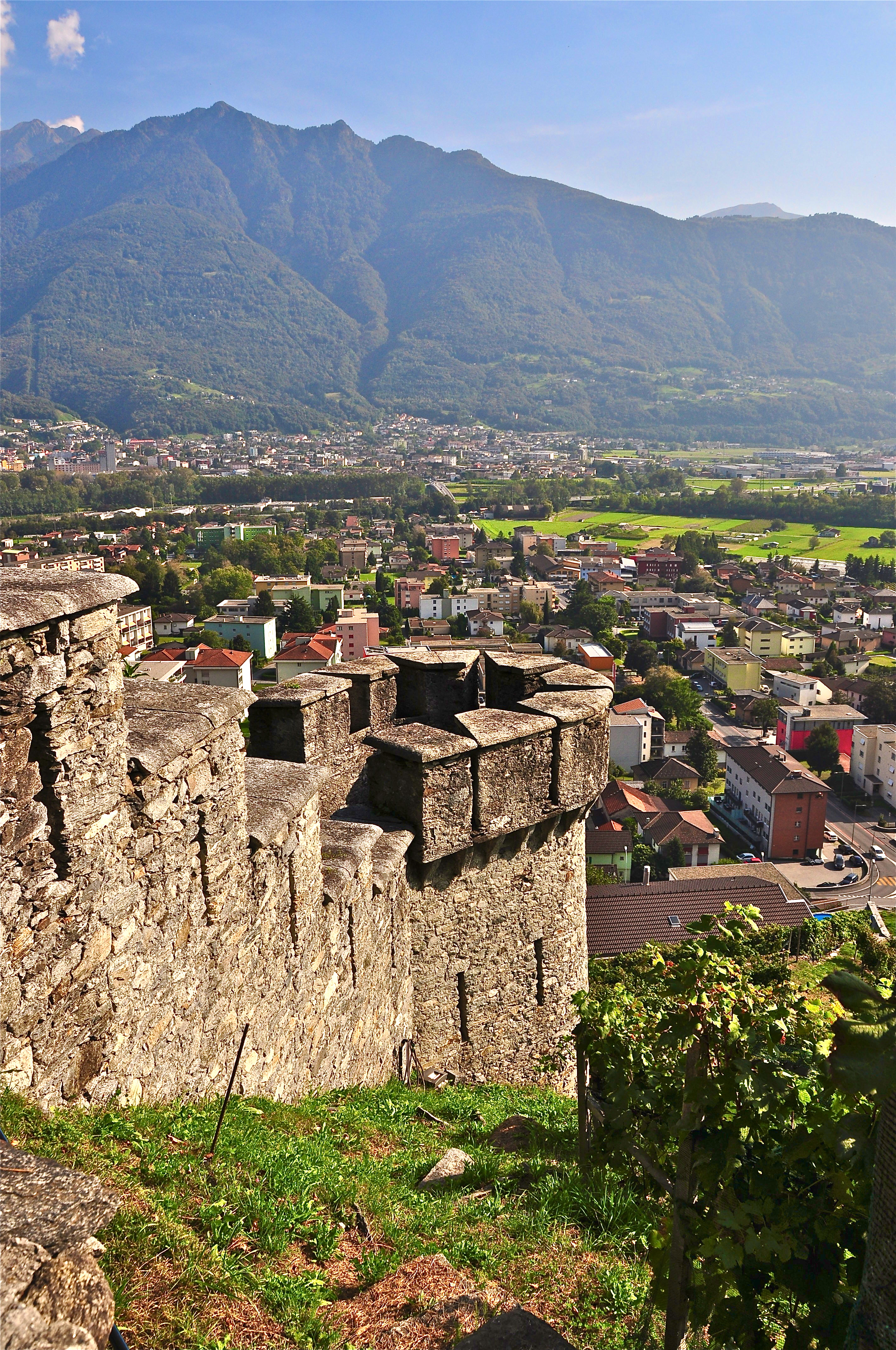 Murata.